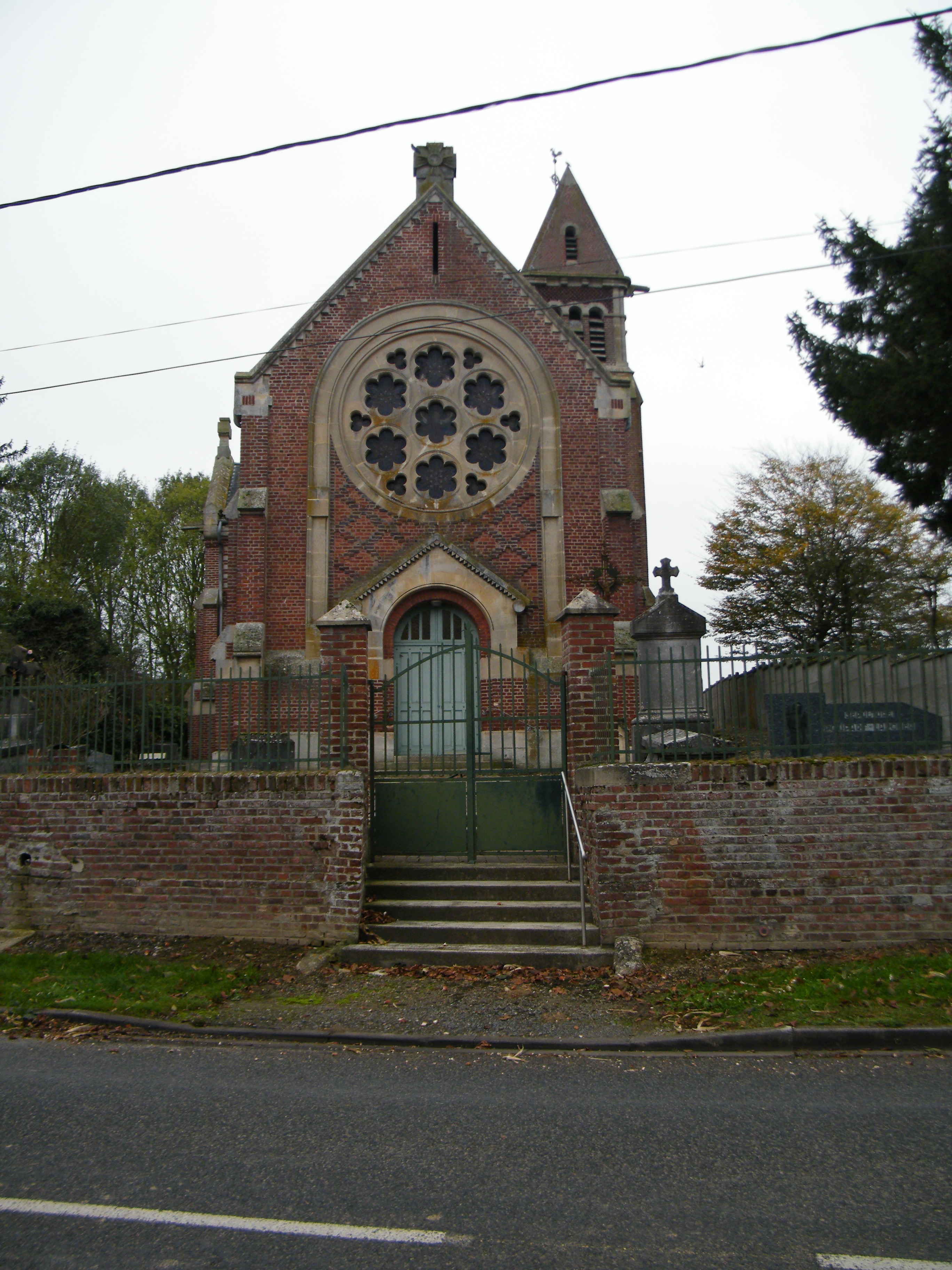 église.